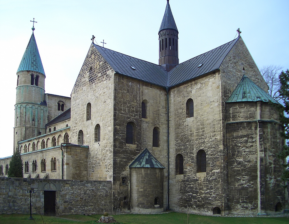 Stiftskirche Gernrode von Osten